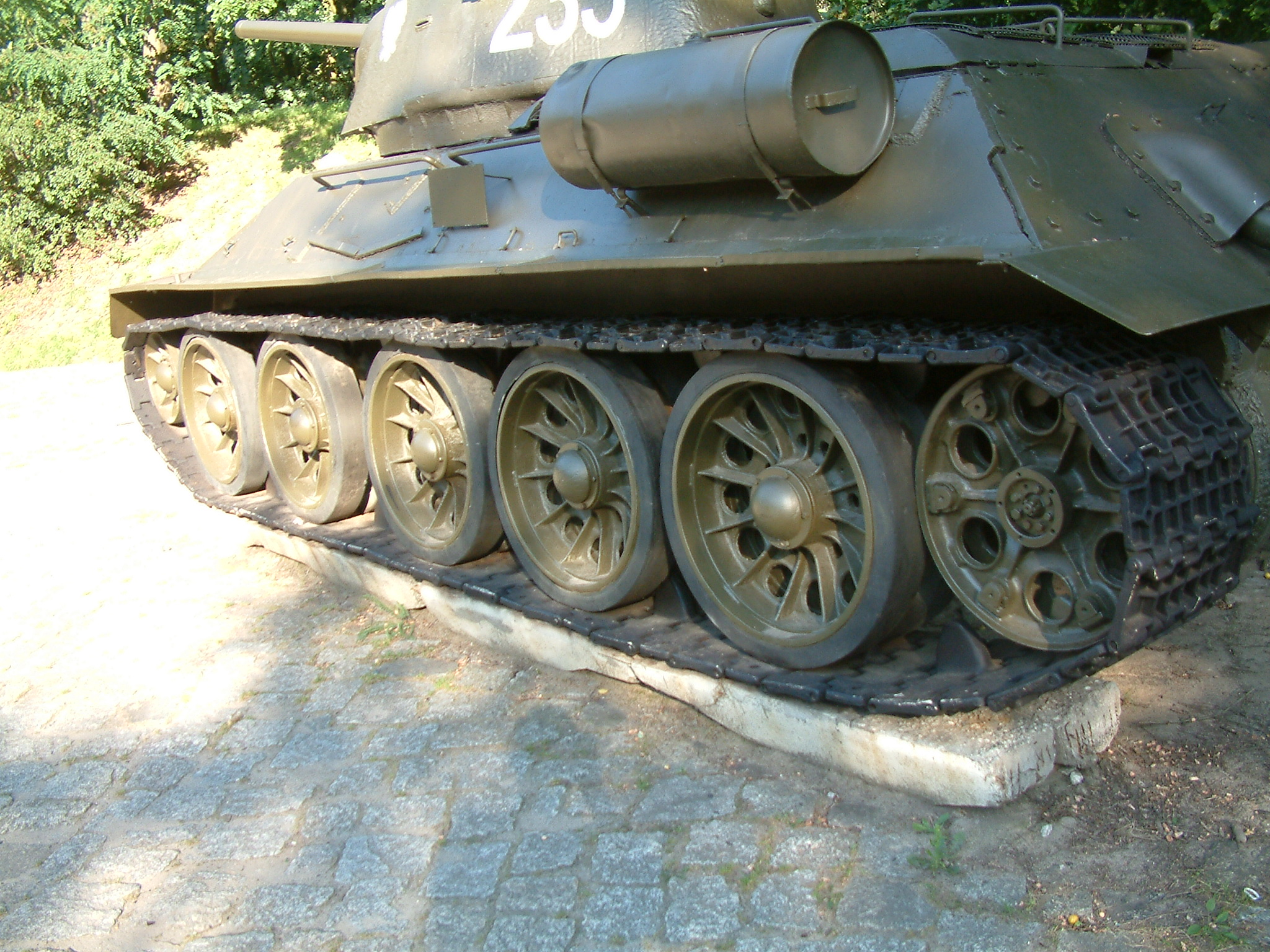 T-34/76 model 1943, Fort Winiary, Poznań